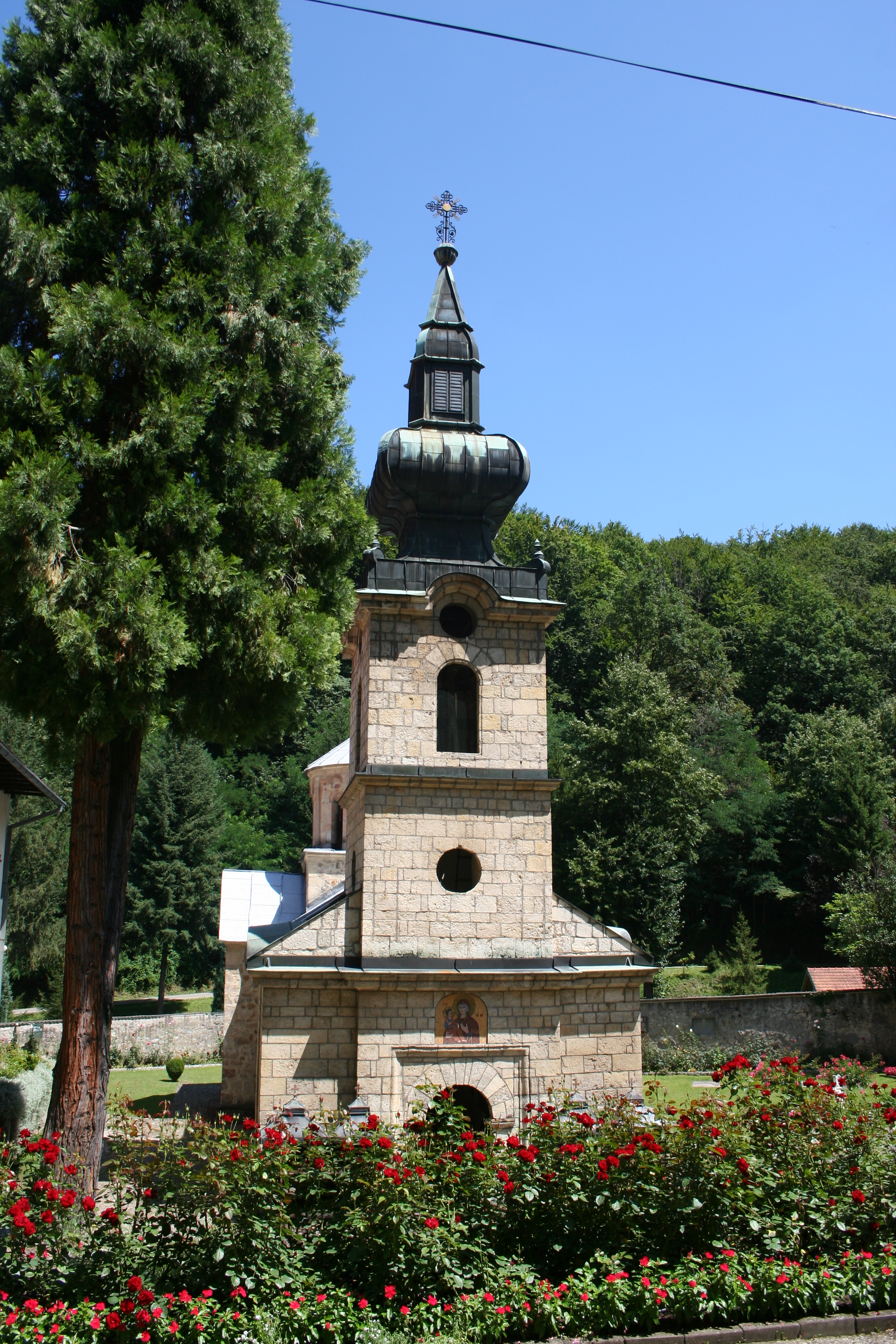 Manastir Tronoša